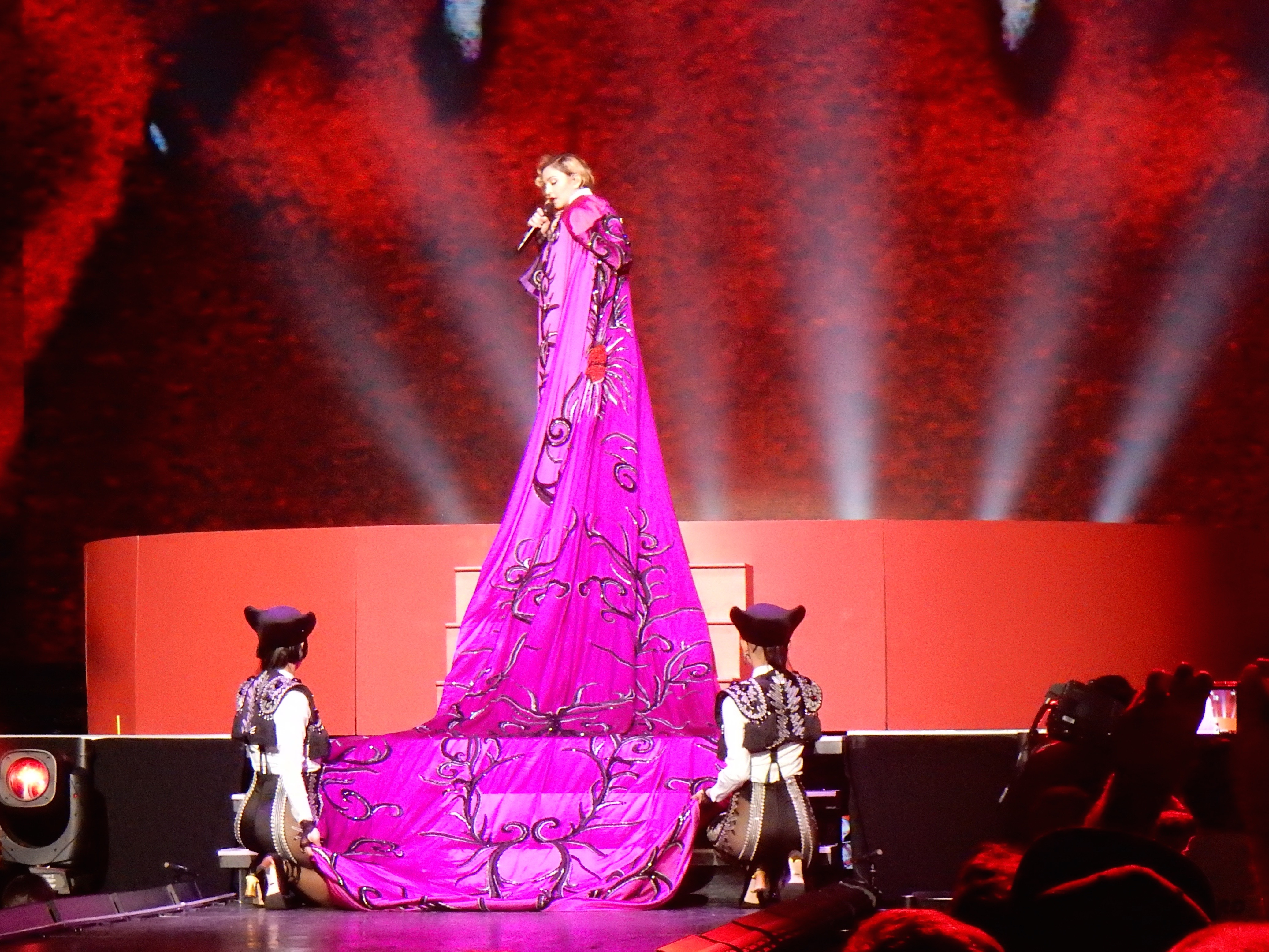 Madonna - Rebel Heart Tour Cologne 2